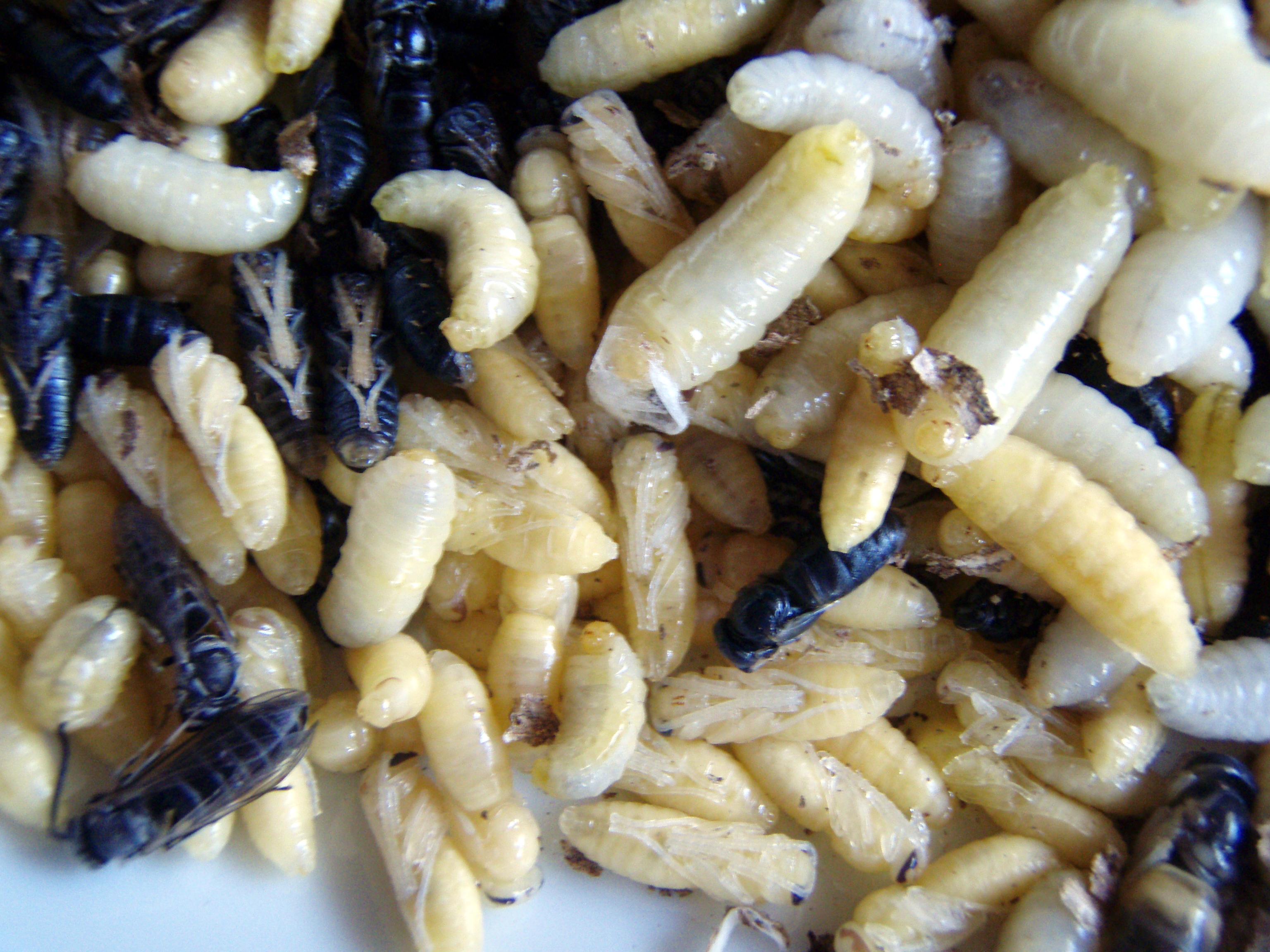 クロスズメバチの幼虫とサナギ、大きな方は親蜂、小さな方は働き蜂。